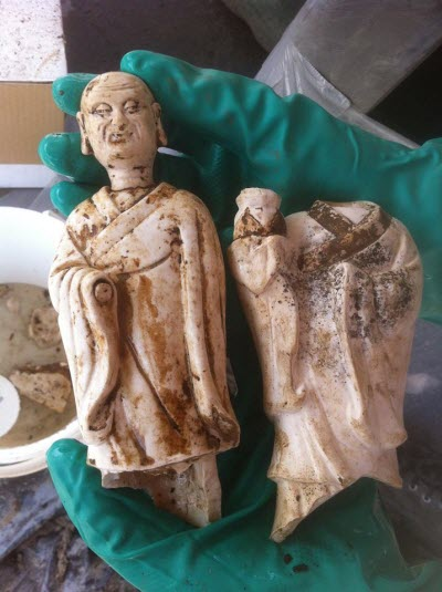 Gevonden in Deventer (Stadshuiskwartier)